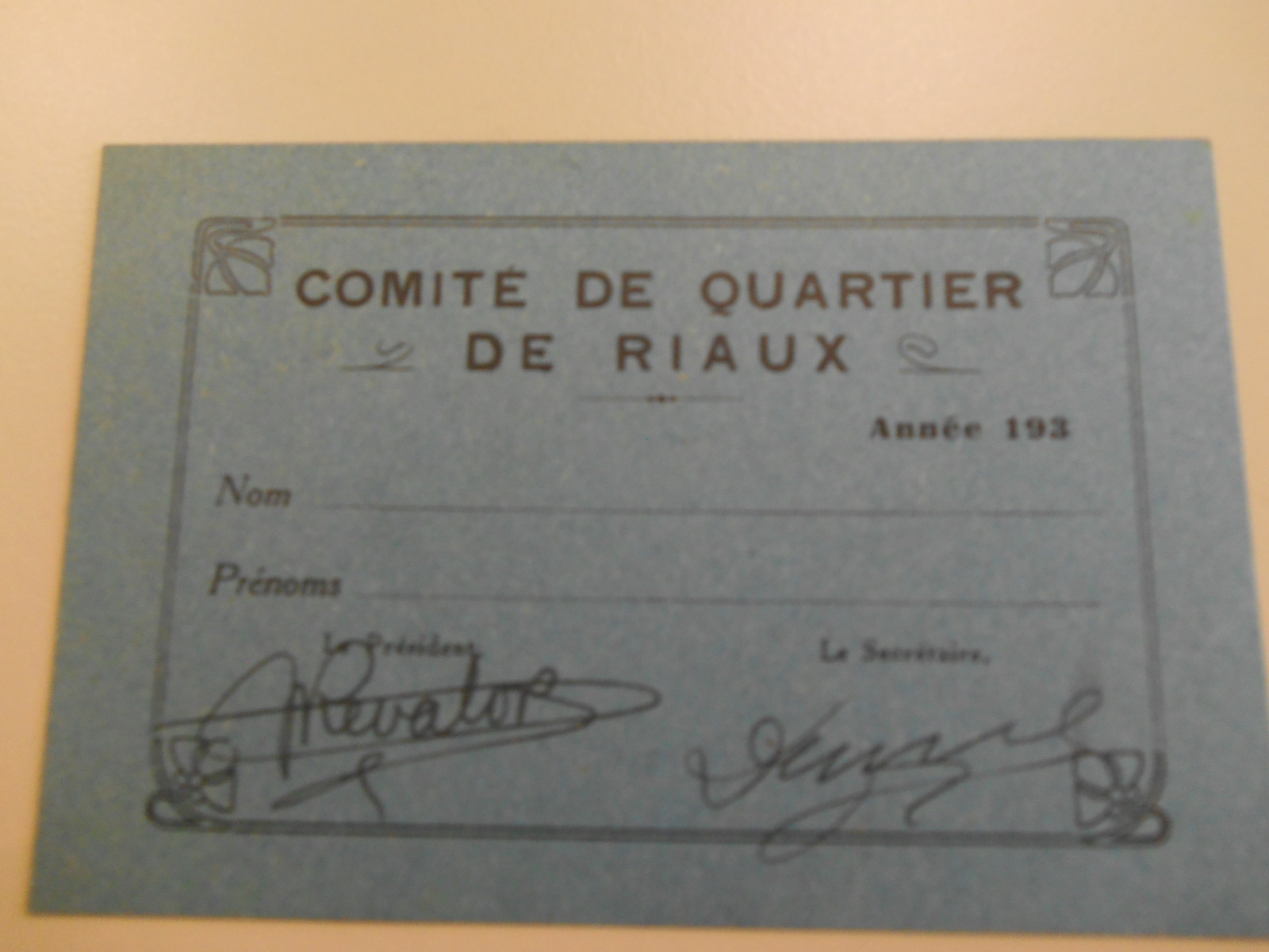 carte membre ciq